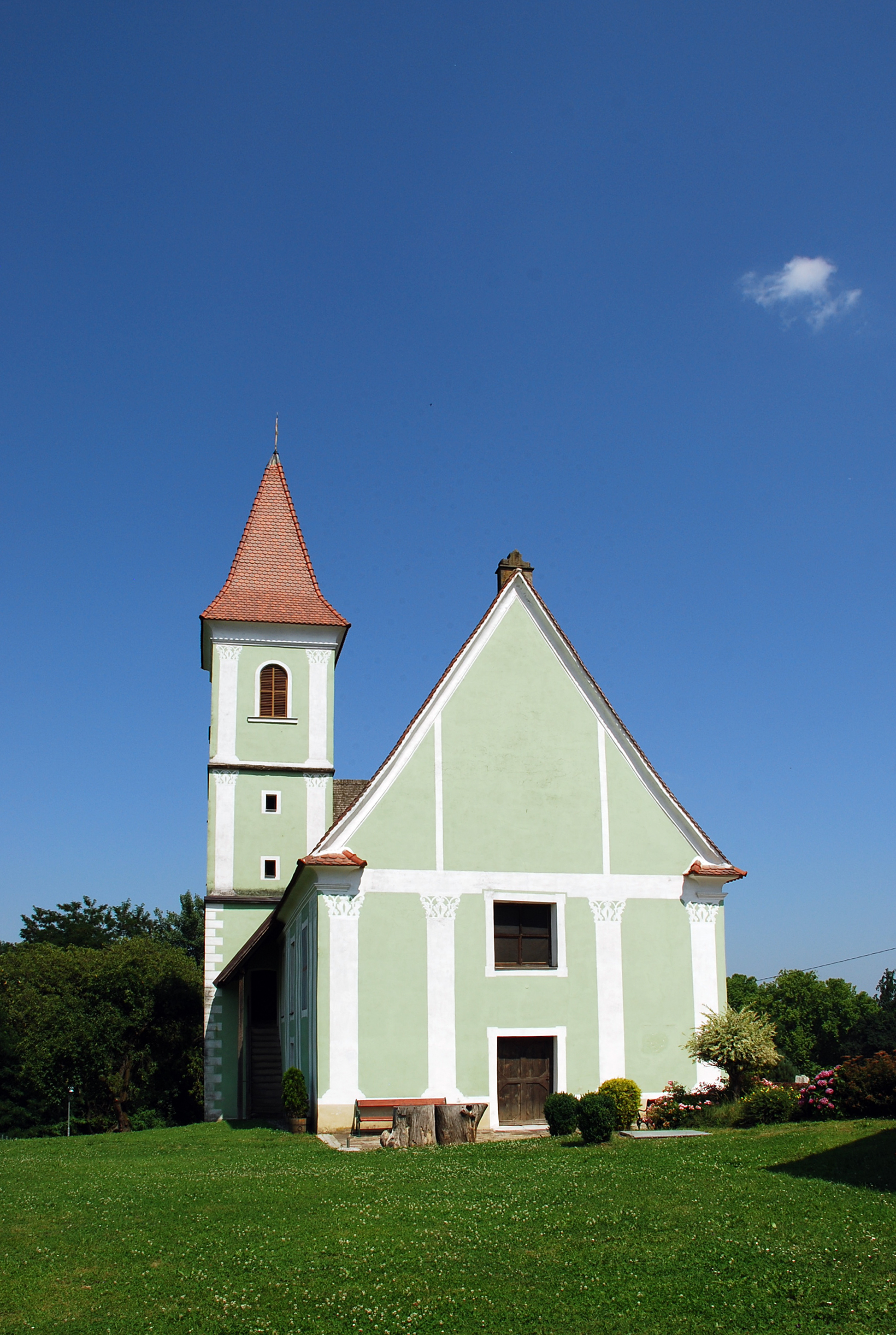 Deutschlandsberg, Steiermark, Österreich: St. Ulrichs-Kirche im Ortsteil Ullrichsberg, Hörbing